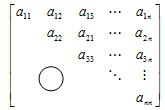 שרטוט מטריצה משולשית עליונה